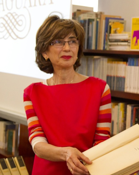 Pilar del Río na biblioteca de A Casa José Saramago, em Lanzarote